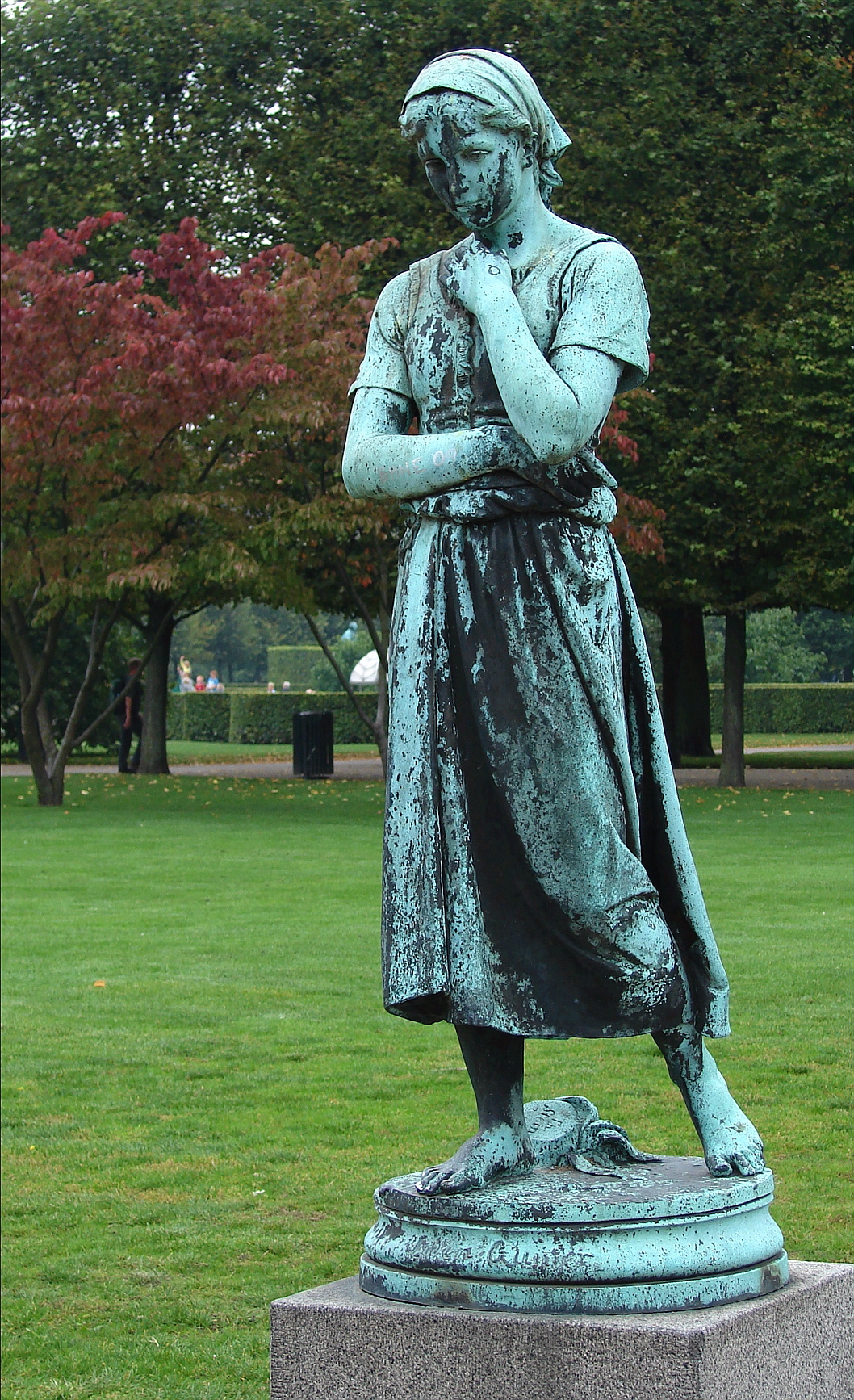 Liden Gunver, Th. Stein, 1898, Kongens Have, København